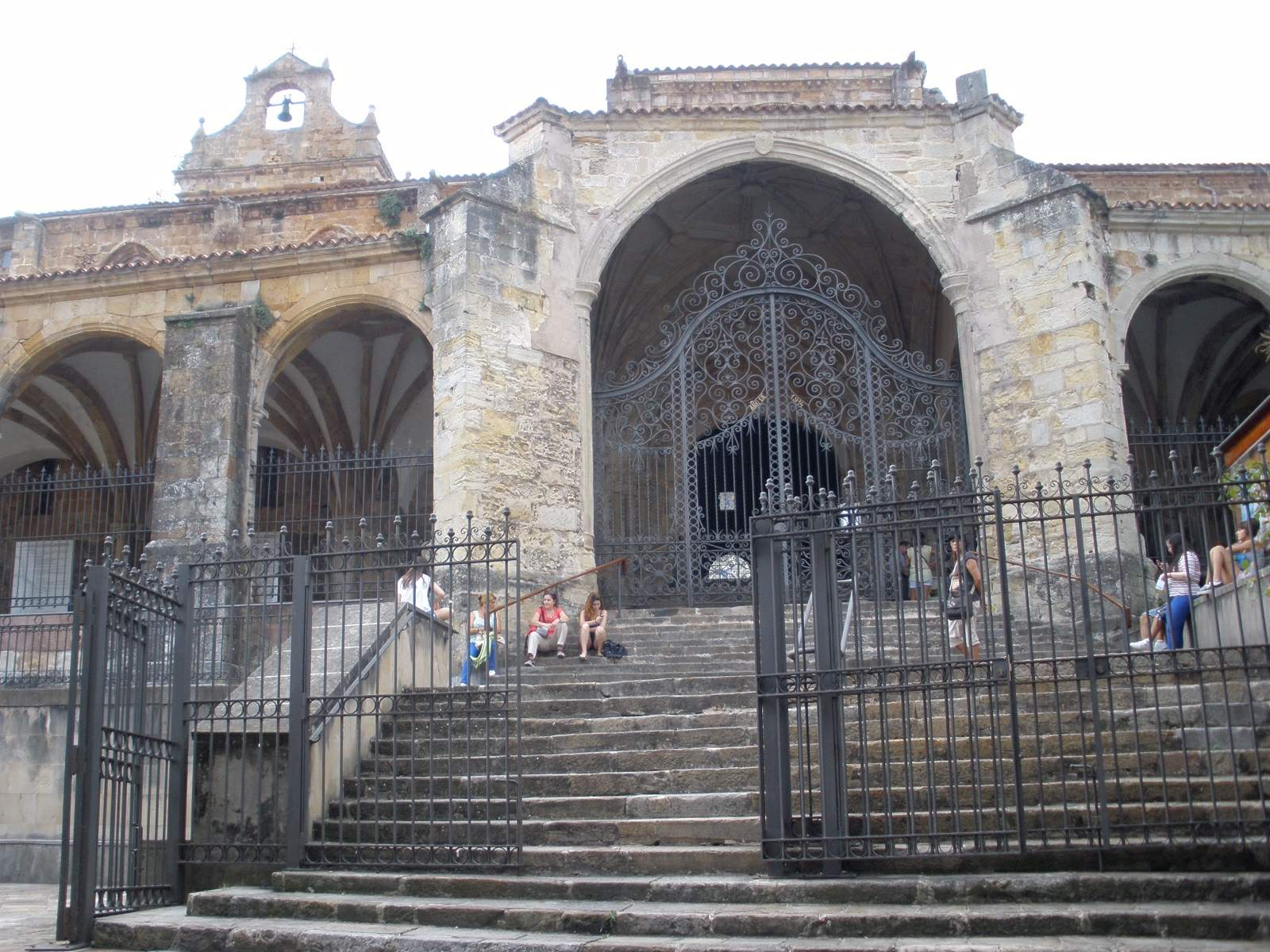 Iglesia de Santa María de la Asunción (Laredo, Cantabria)